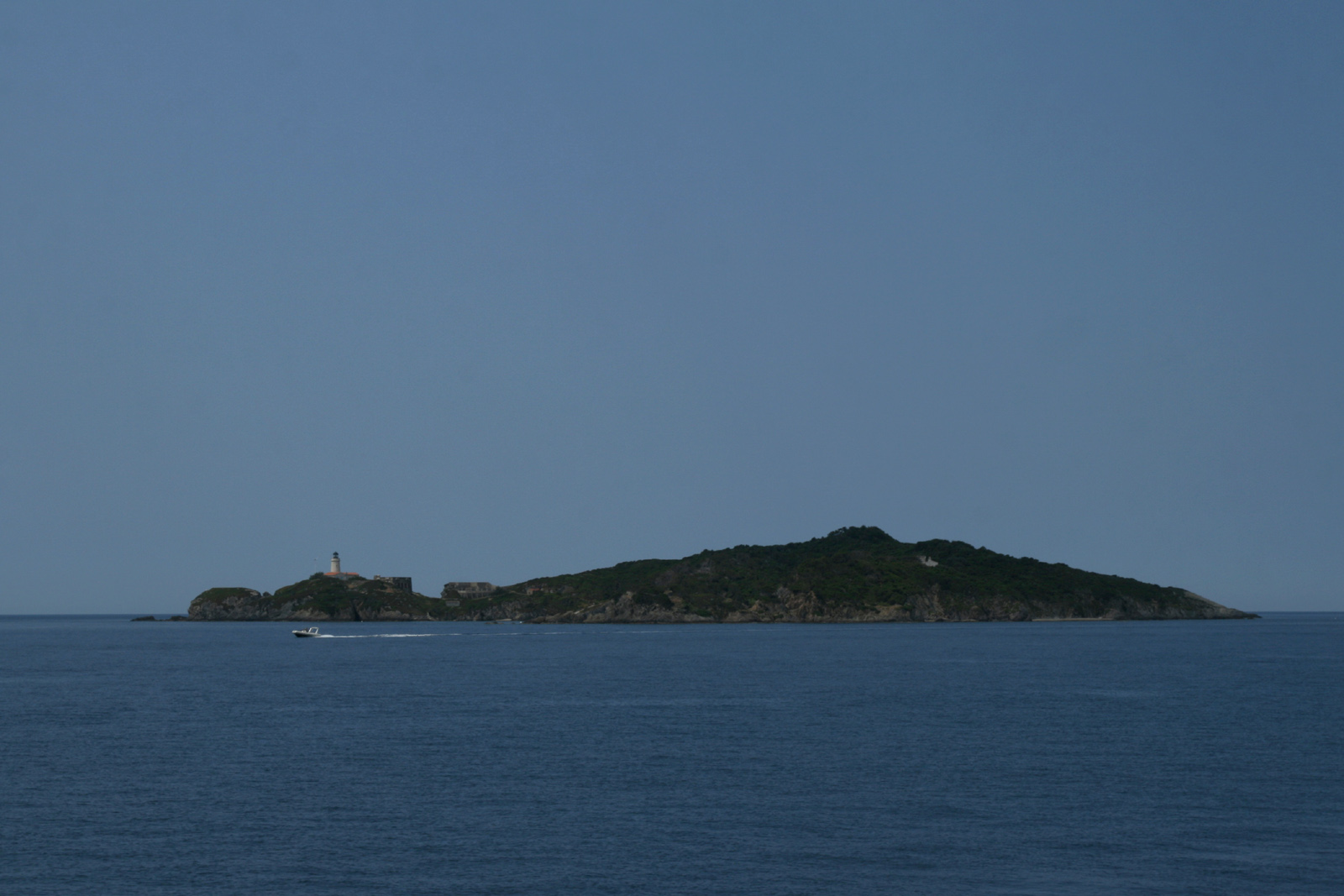 Ile du Grand-Ribaud